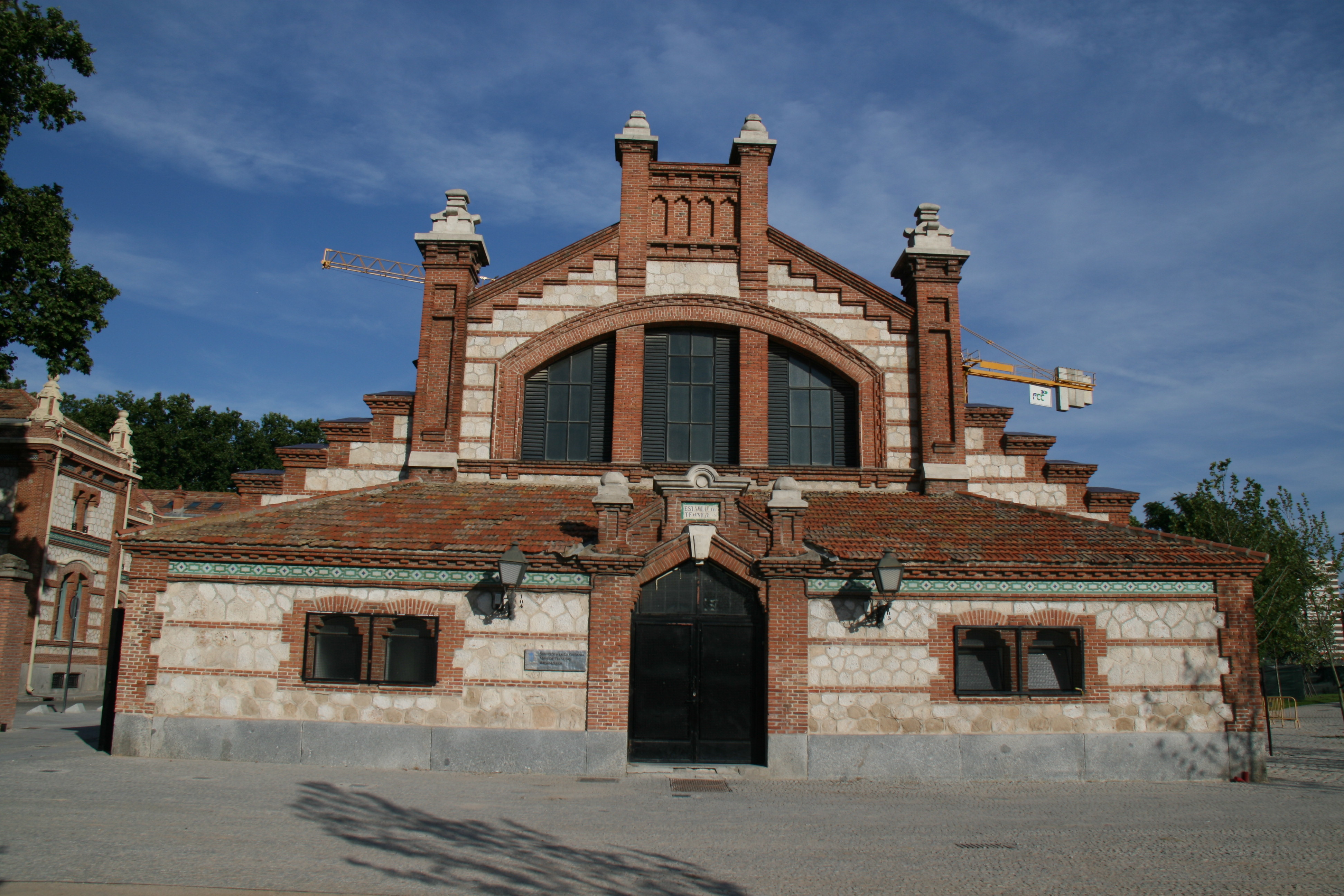 Casa de Terneras -Establo - Matadero de Arganzuela